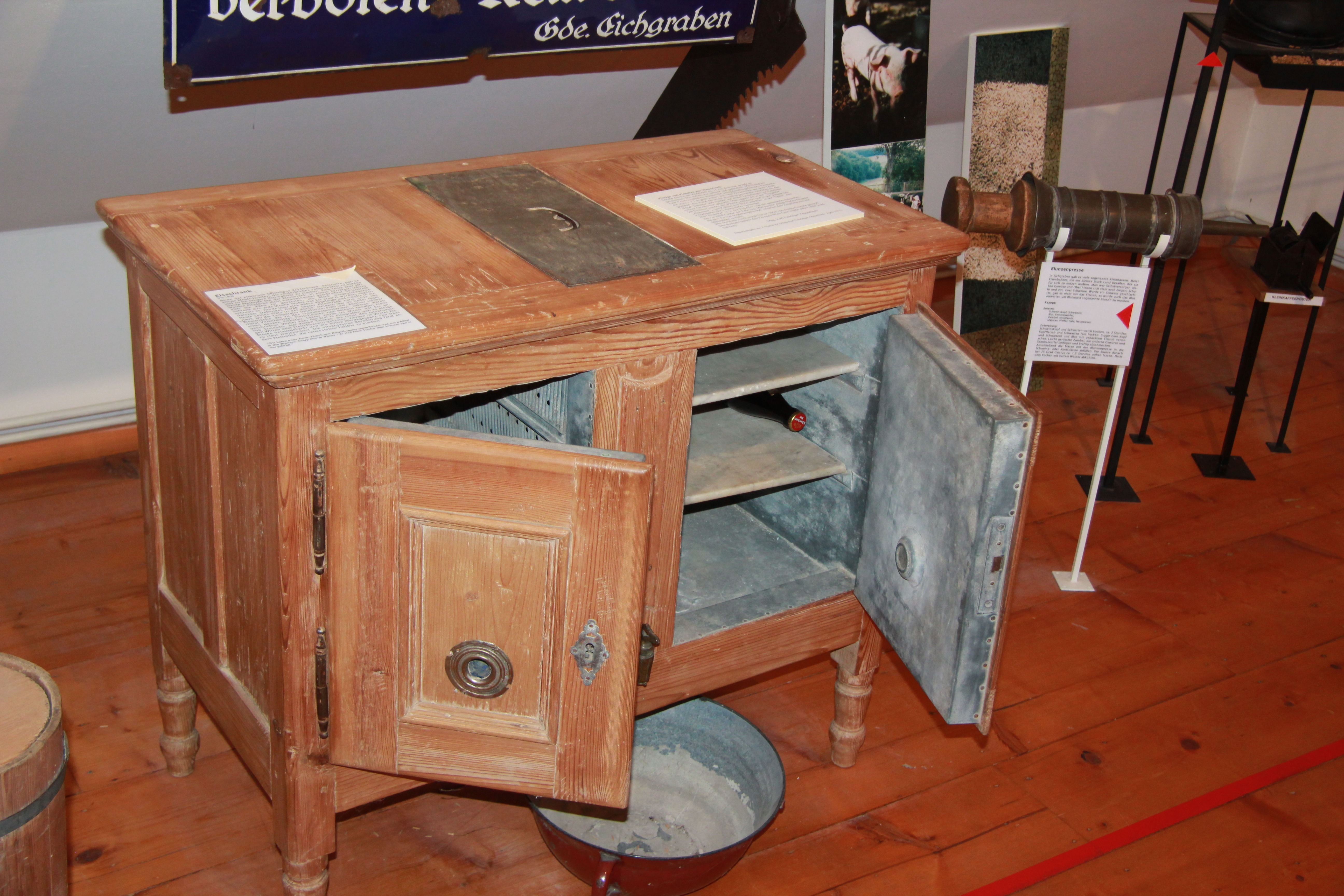 Ausstellungsstücke des Wienerwaldmuseums, Eichgraben, Niederösterreich: Eisschrank um 1906